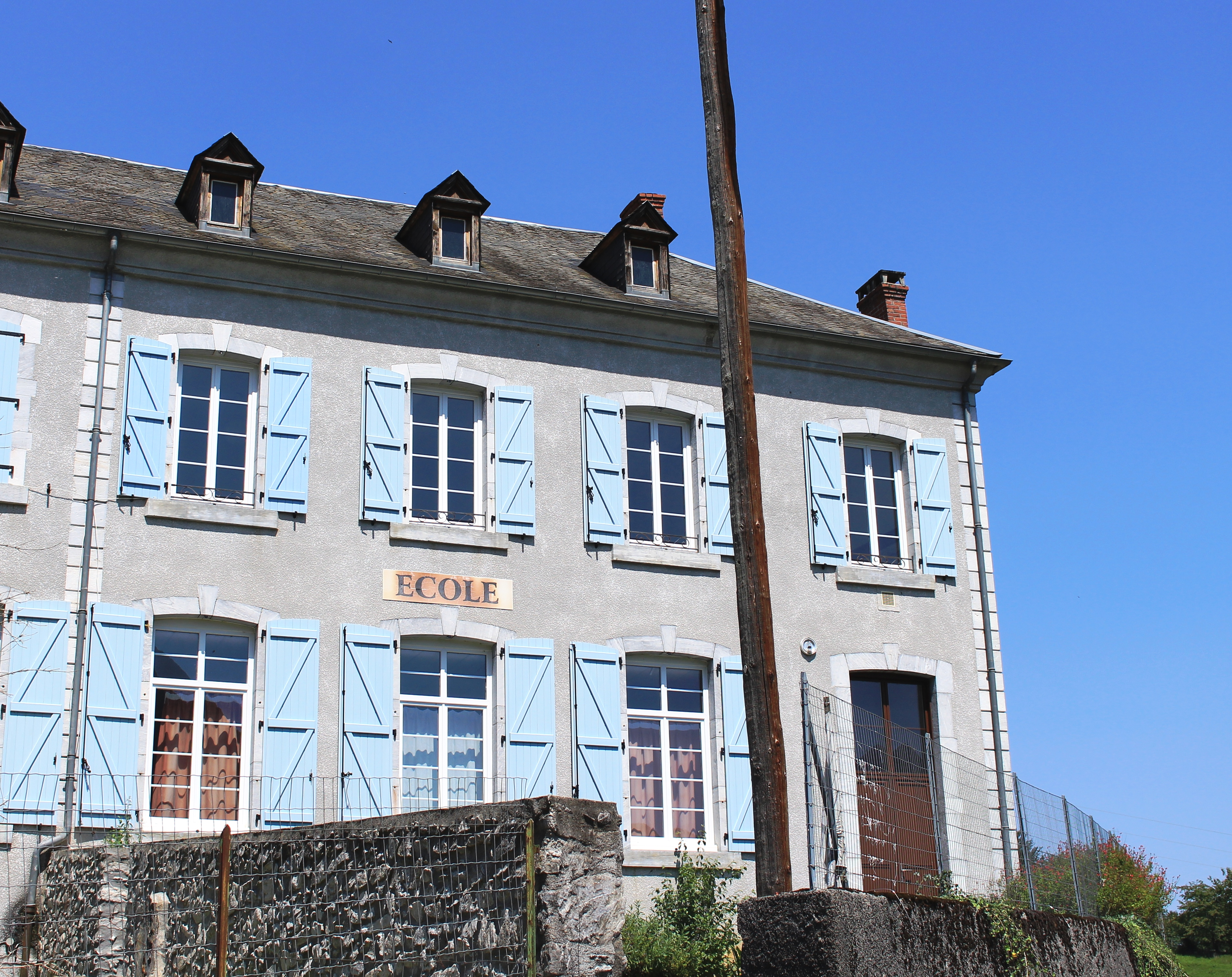 École de Laborde (Hautes-Pyrénées)